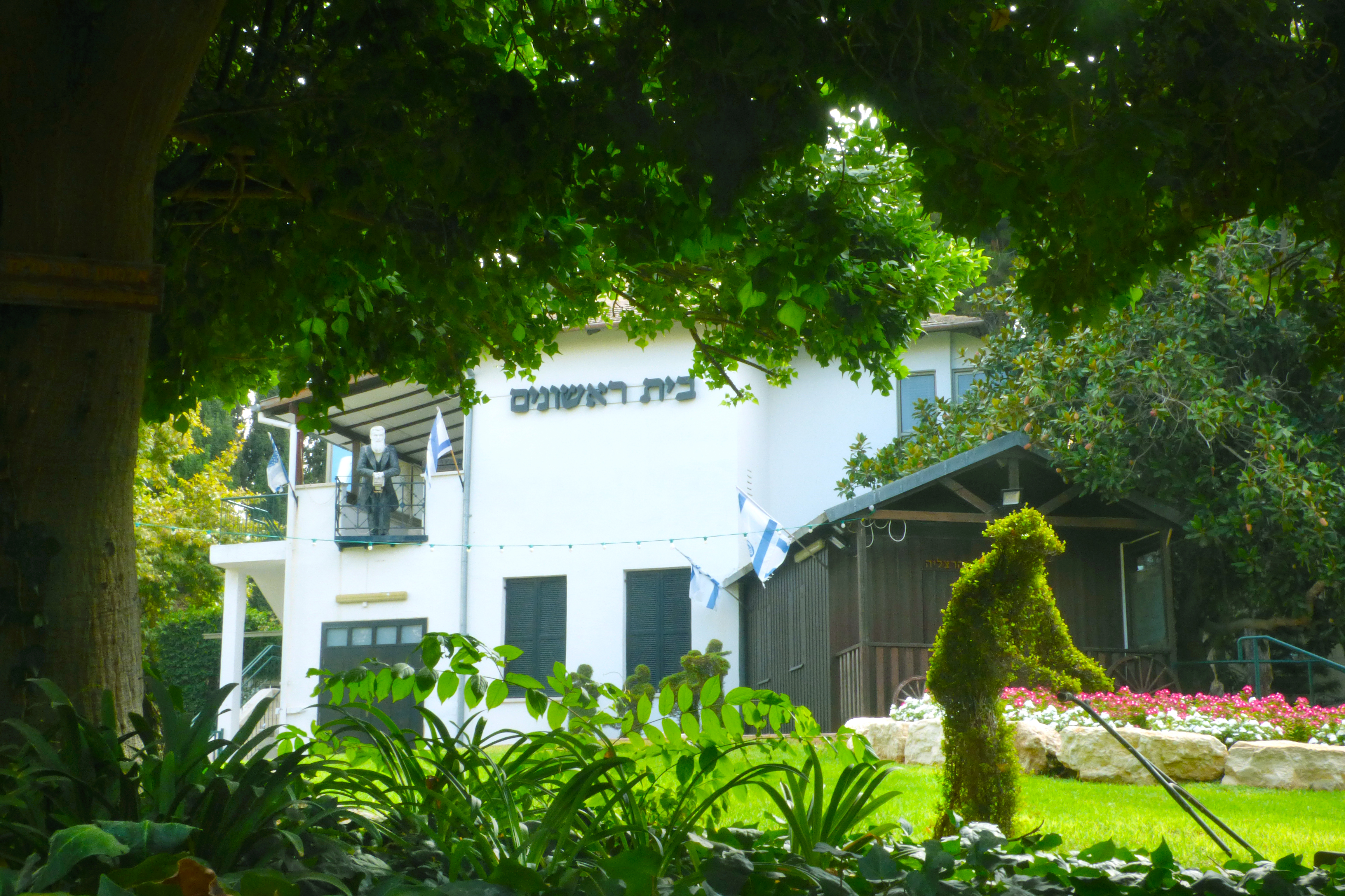 בית הראשונים - מוזיאון לתולדות הרצליה